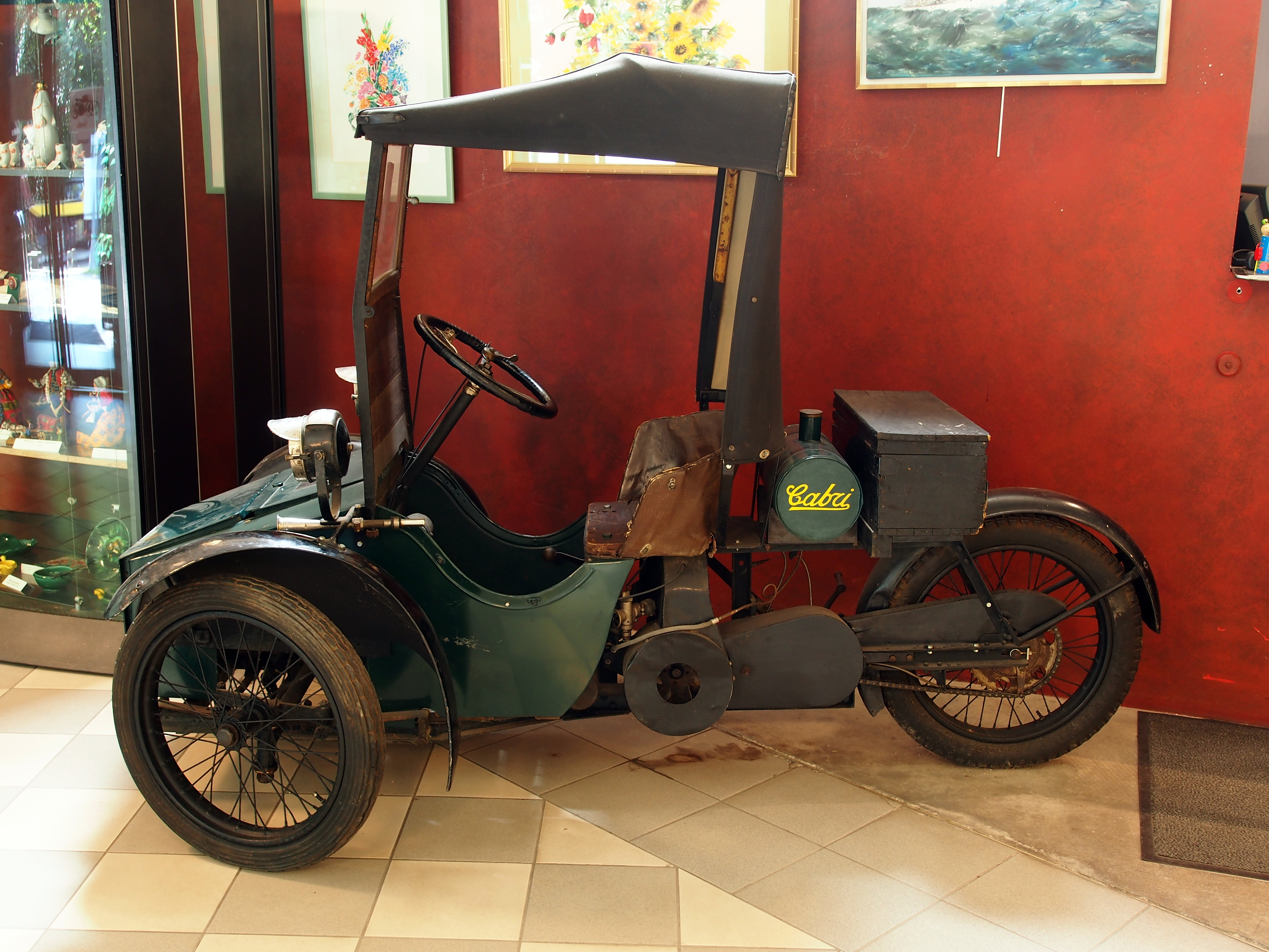 Photographed at the Musée de la Moto et du Vélo, Amneville, France.